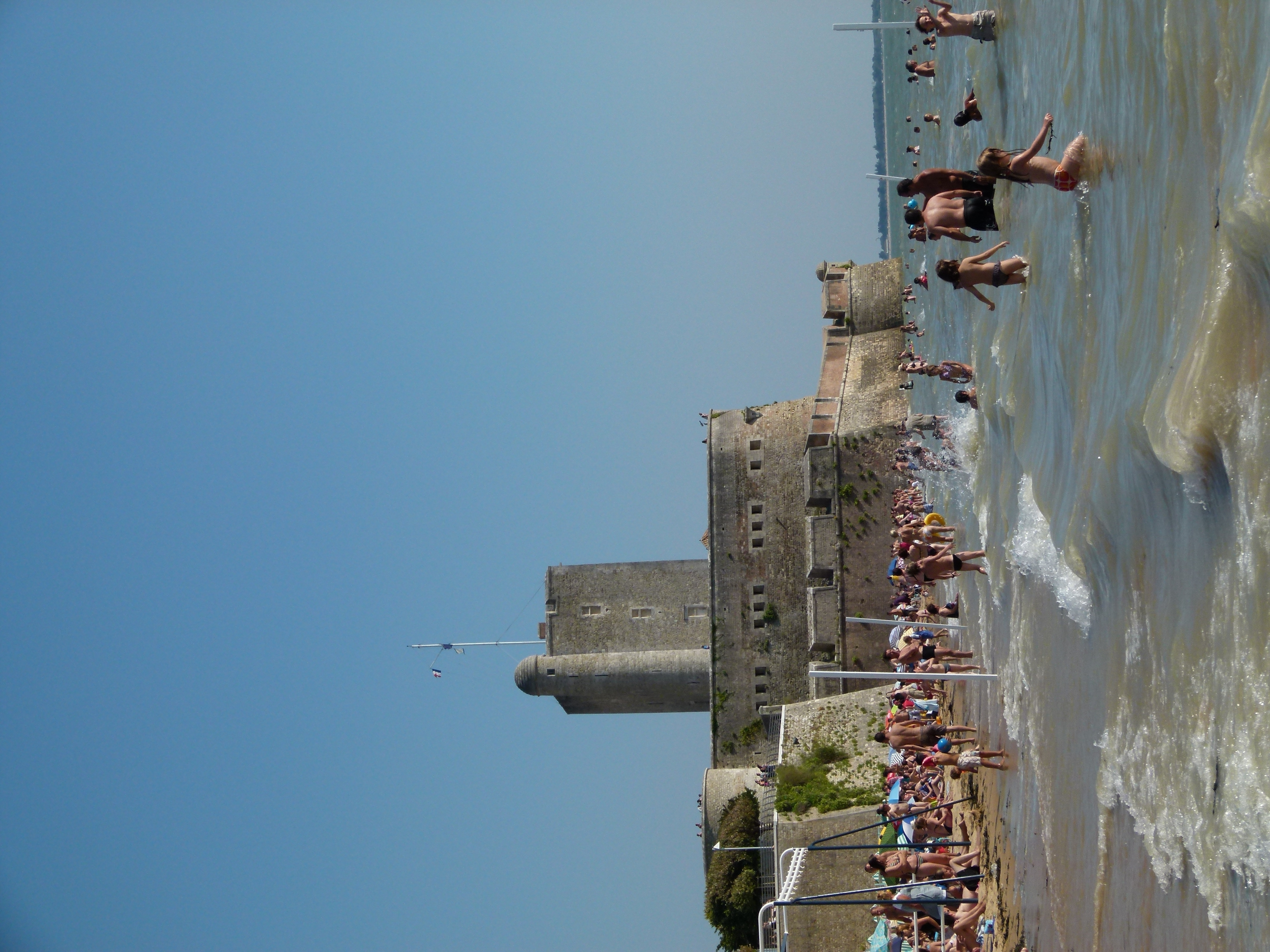 La plage de Fouras près du site de fort Vauban.